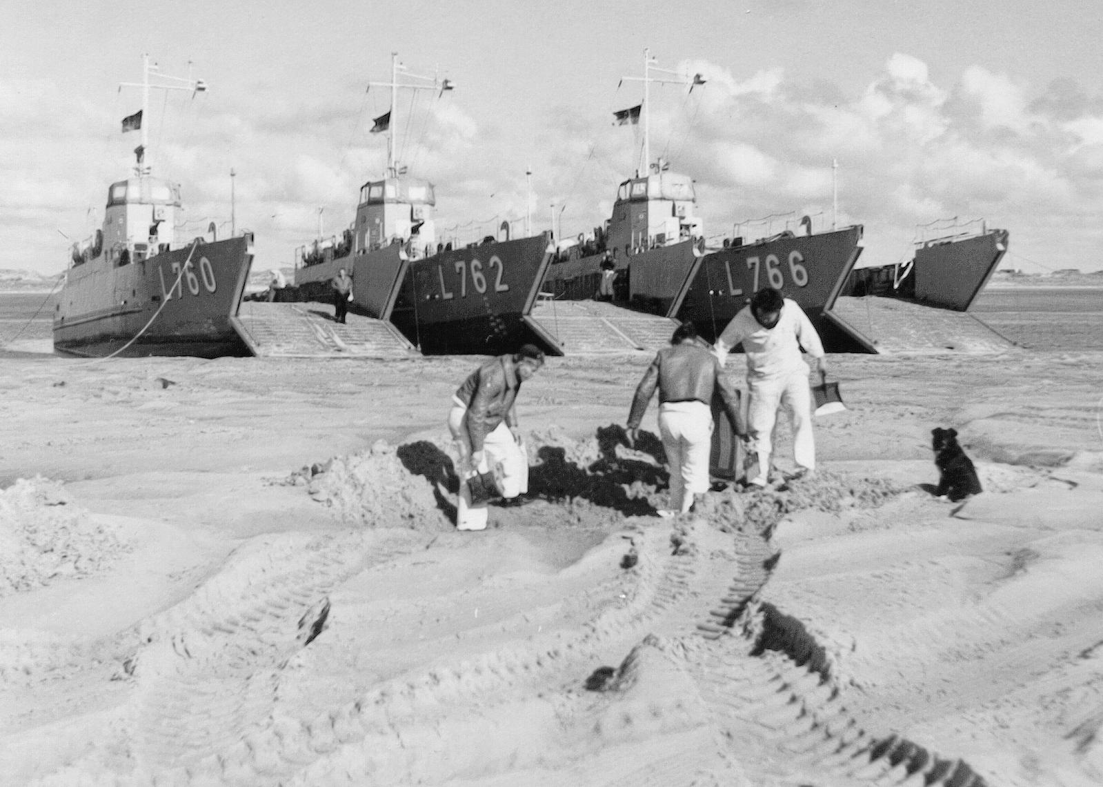 Lachs,Flunder und Stör bei Esbjerg und Lupo F.Lang eig.Bild 1967